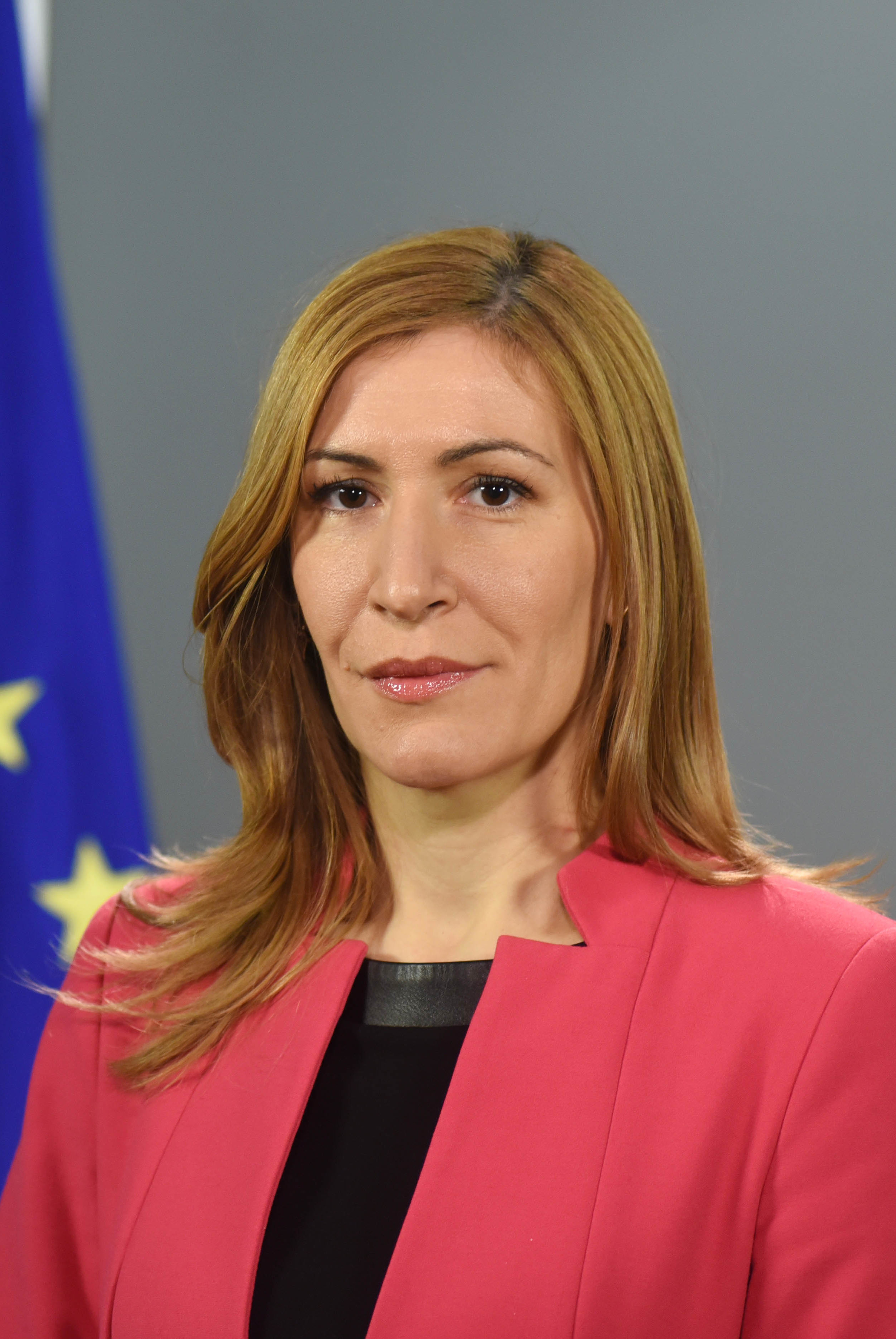 Photo: Velislav Nikolov (EU2018BG)